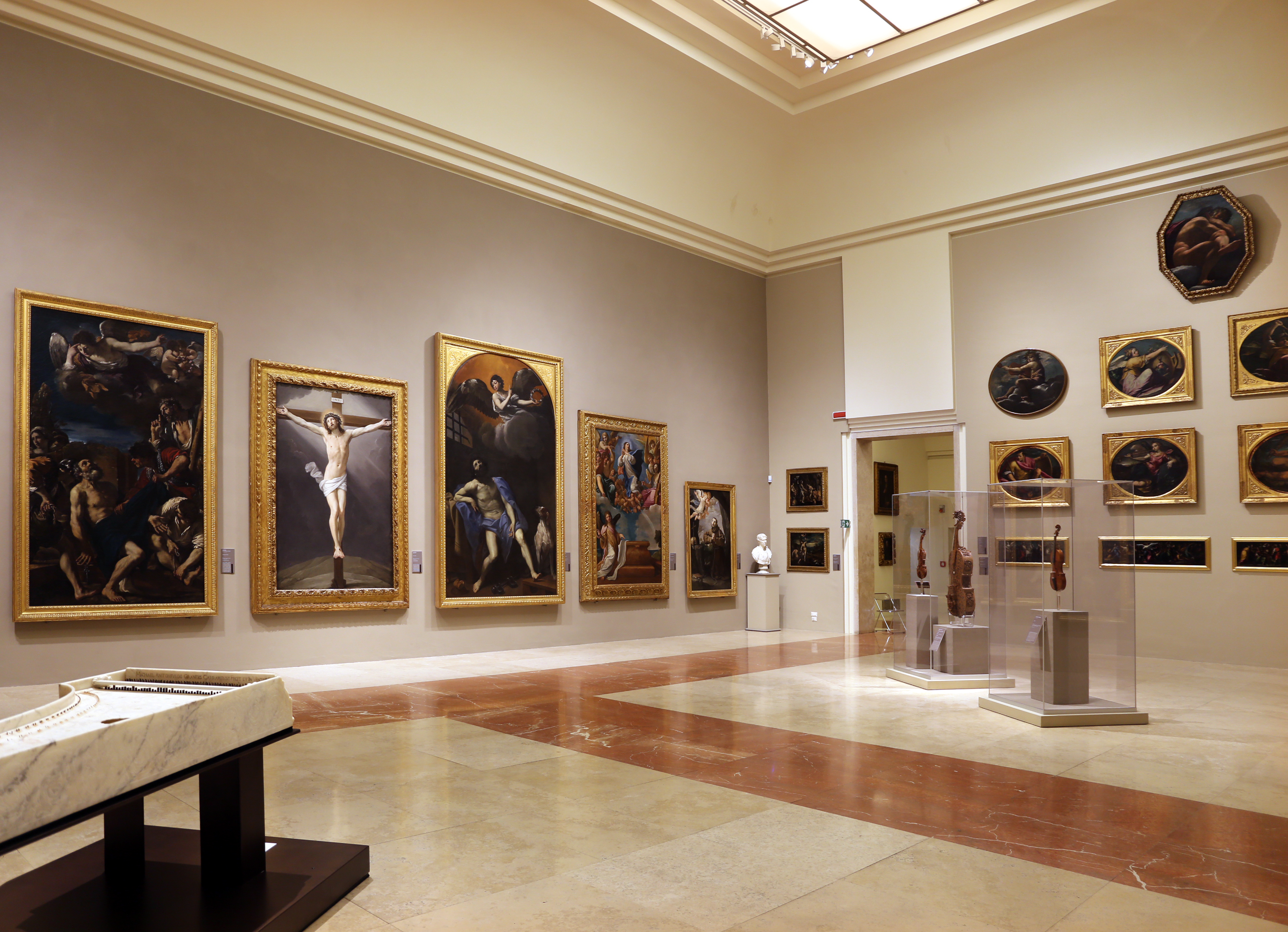 Palazzo dei musei This is a photo of a monument which is part of cultural heritage of Italy.